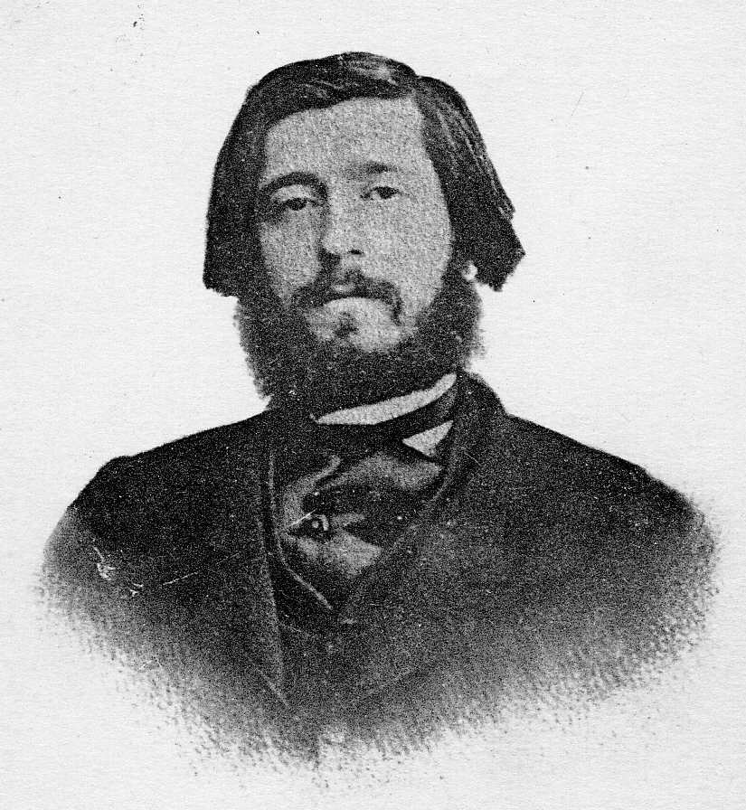 Charles de Gaulle (1837-1880), écrivain et linguiste, défenseur de la langue bretonne et du celtisme. Carte postale F. Château, conservée aux Archives de Rennes, 100 Fi 448